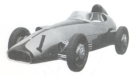 Bandini formula junior picture from Bandini book